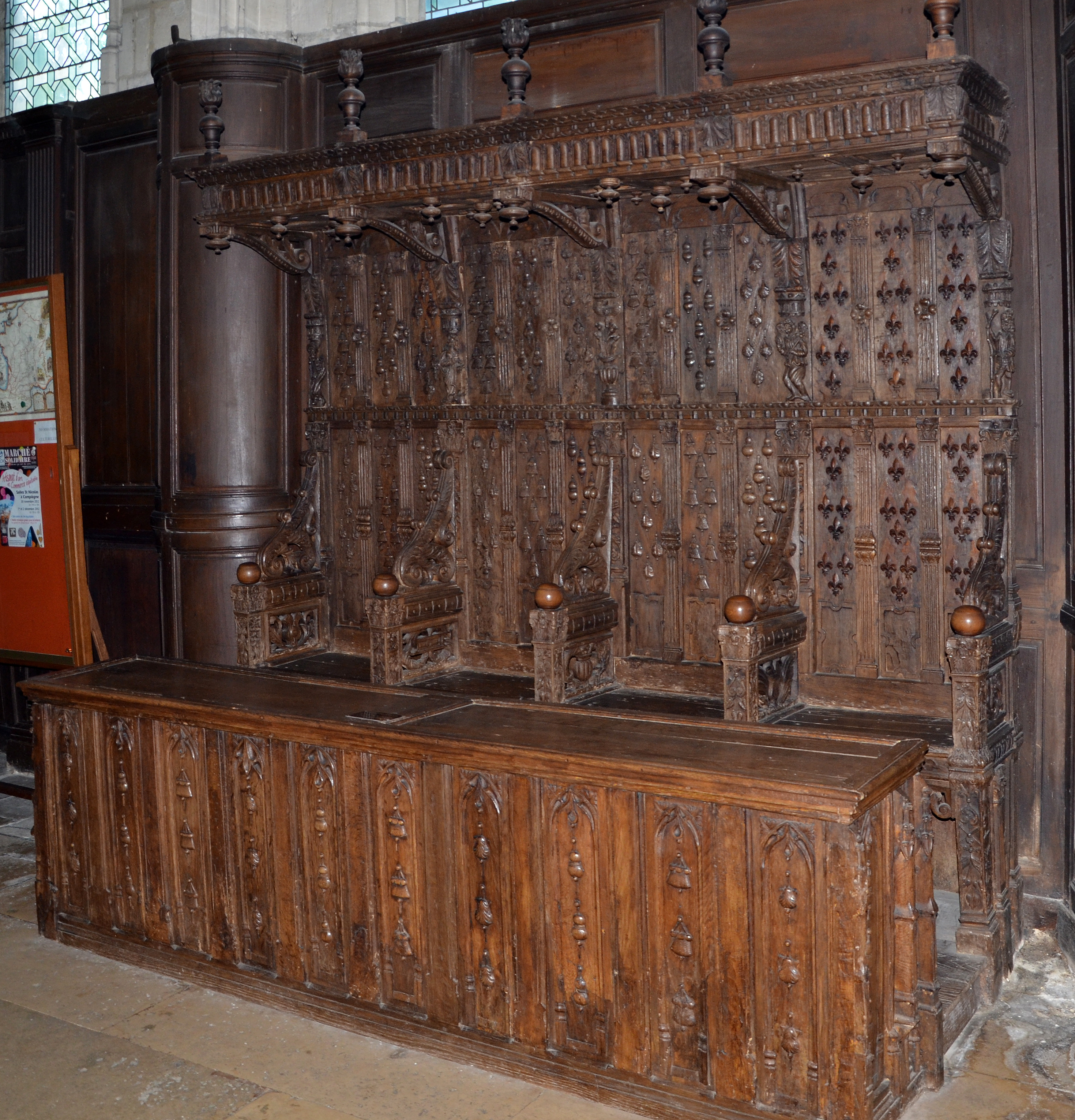 Église Saint-Jacques de Compiègne, Oise, Picardie, France